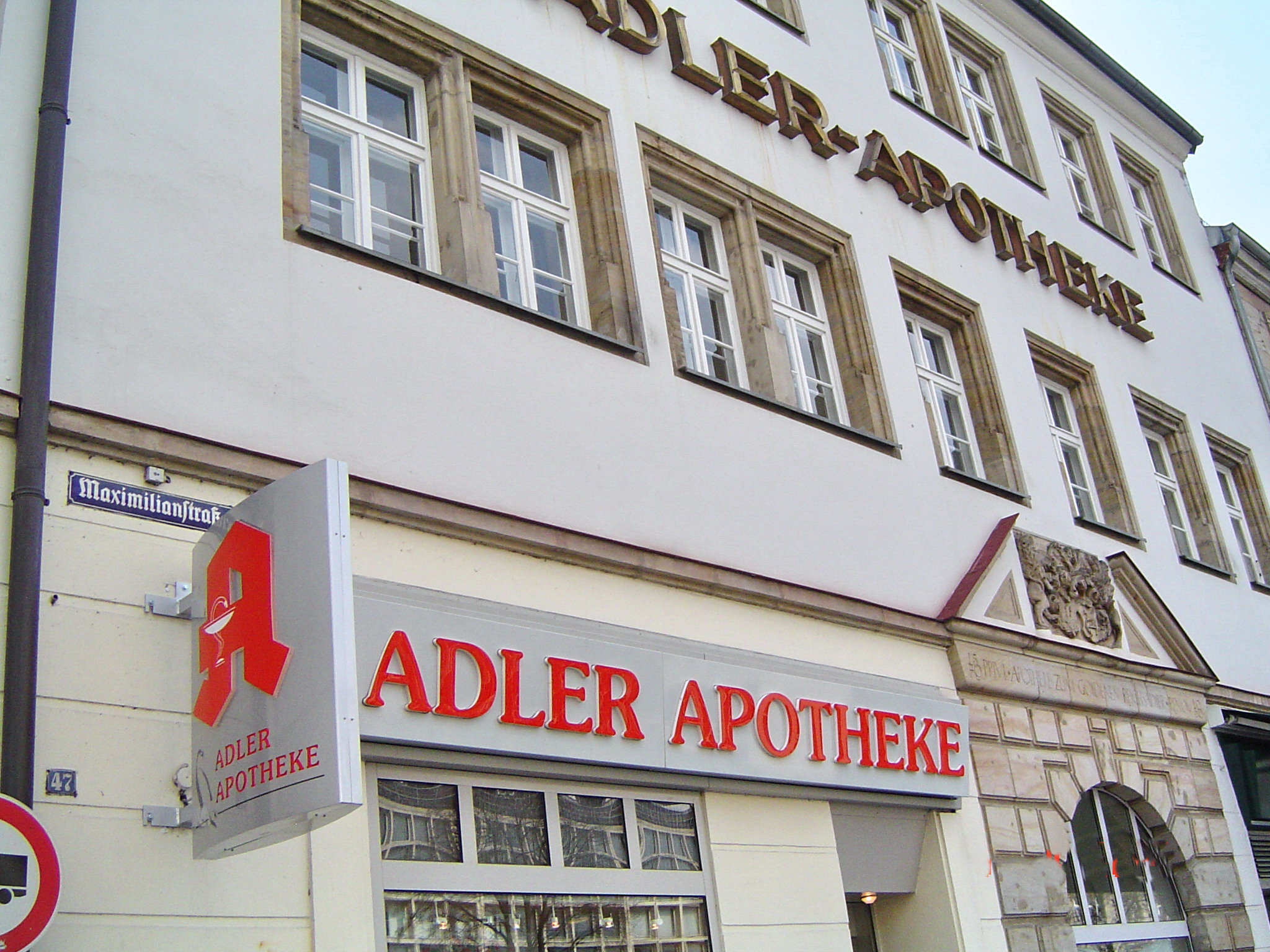 Bayreuth, Adler-Apotheke, Maximilianstrasse 47, Denkmal Nr. D-4-62-000-237